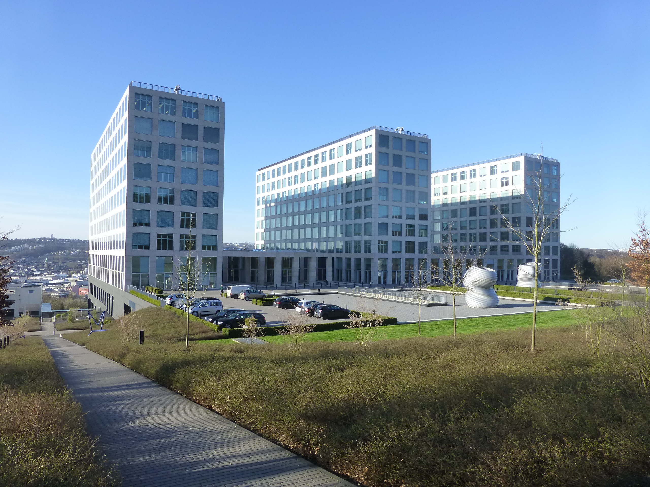 Barmenia-Allee, Wuppertal